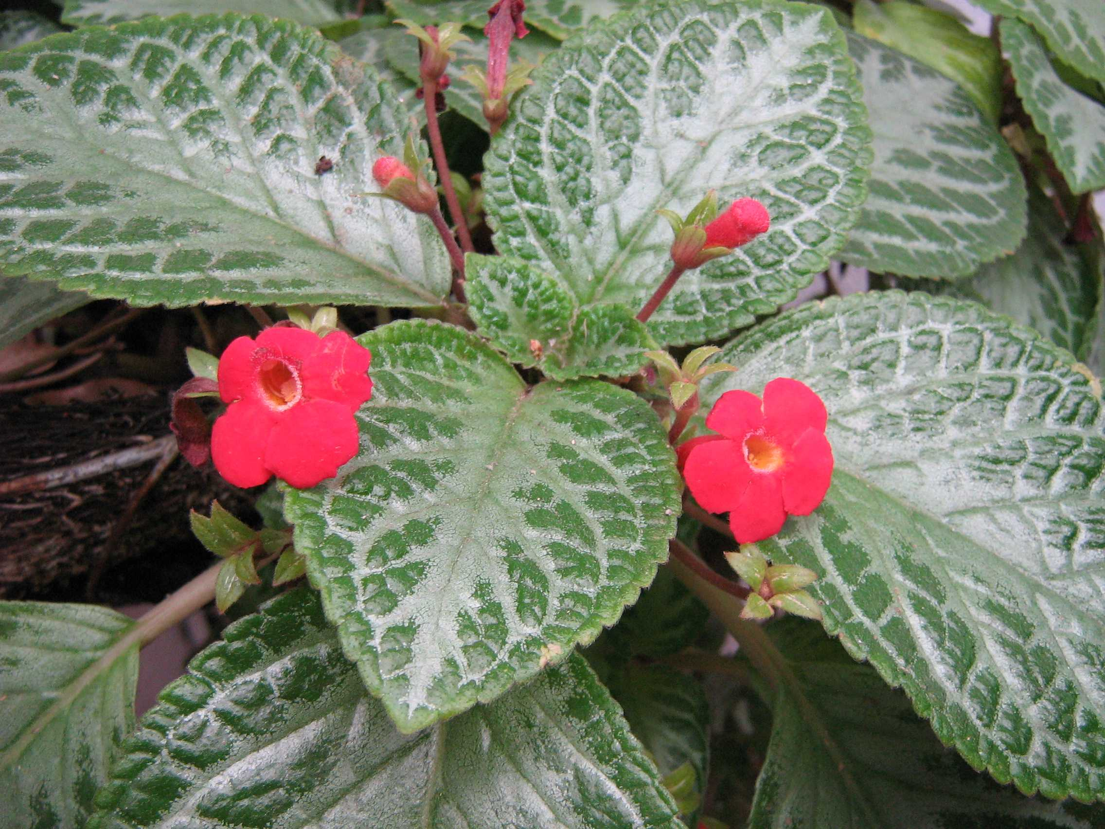 Flores